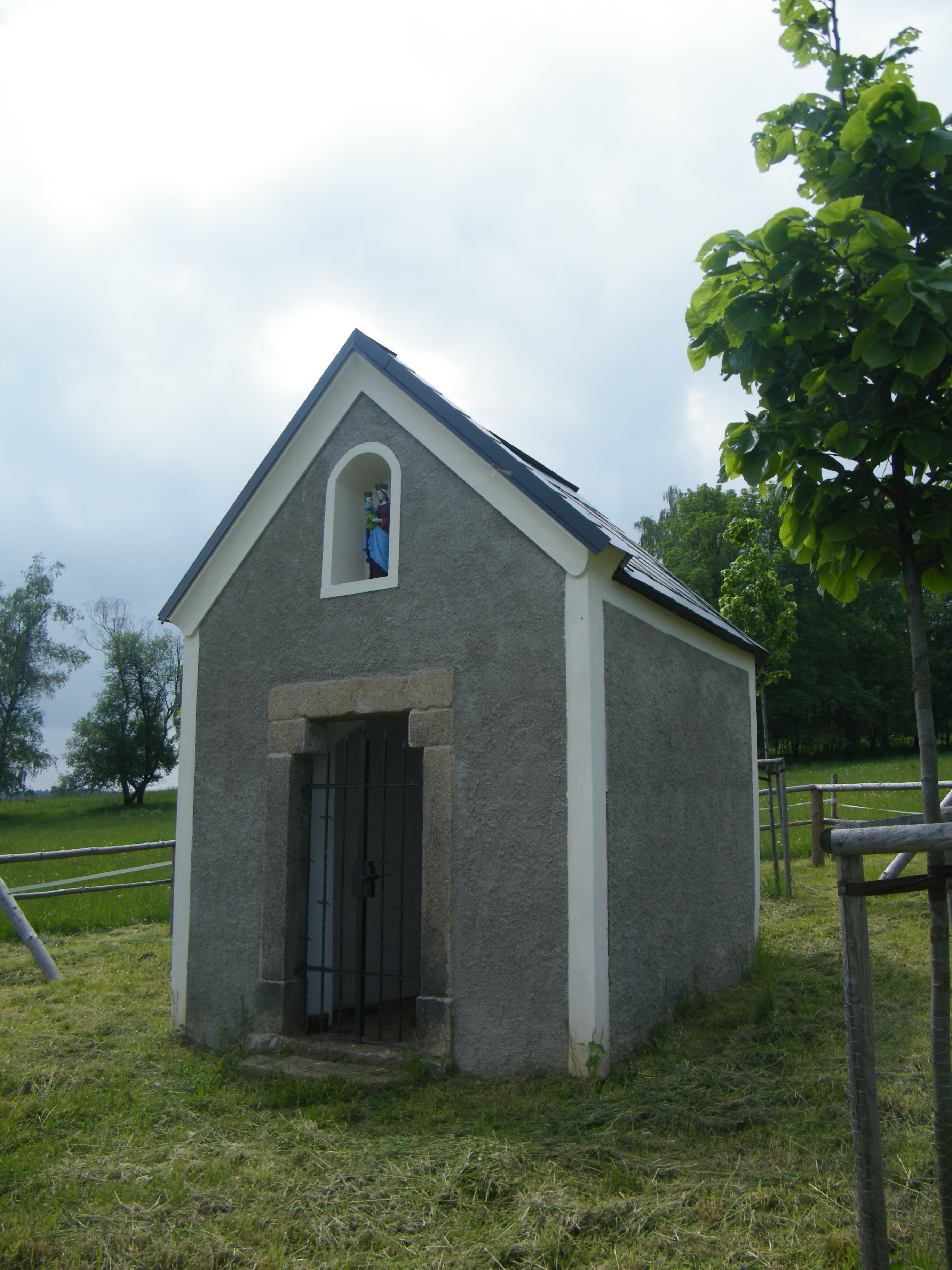 Botzenská (Mariánská) kaple v Císařském